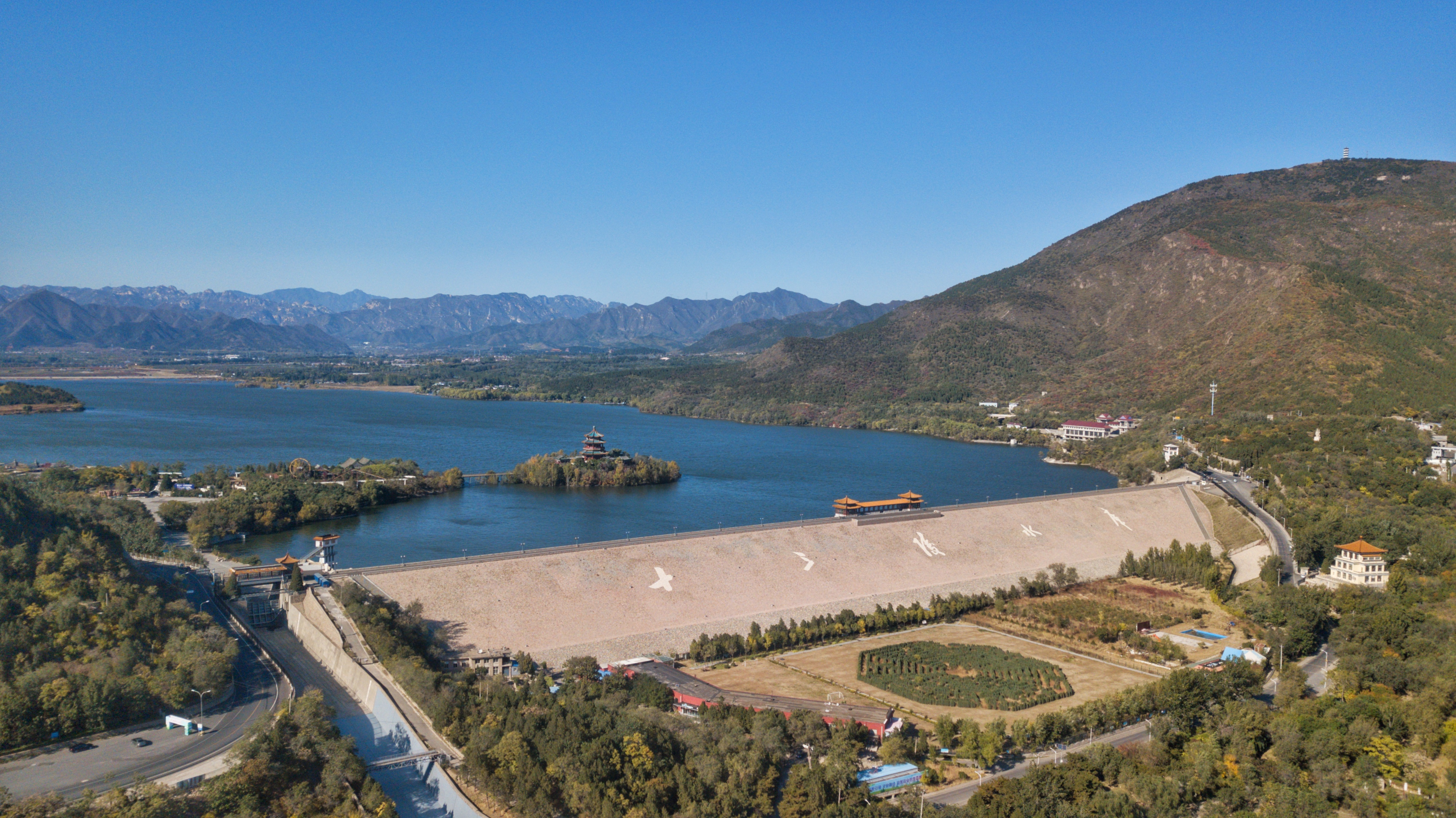 中文（中国大陆）: 十三陵水库，2019年秋。